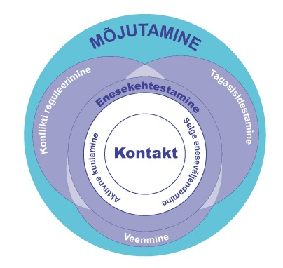 Suhtlemise kompleksoskuse - mõjutamise - seosed ja asuoht teiste suhtlusoskuste hulgas